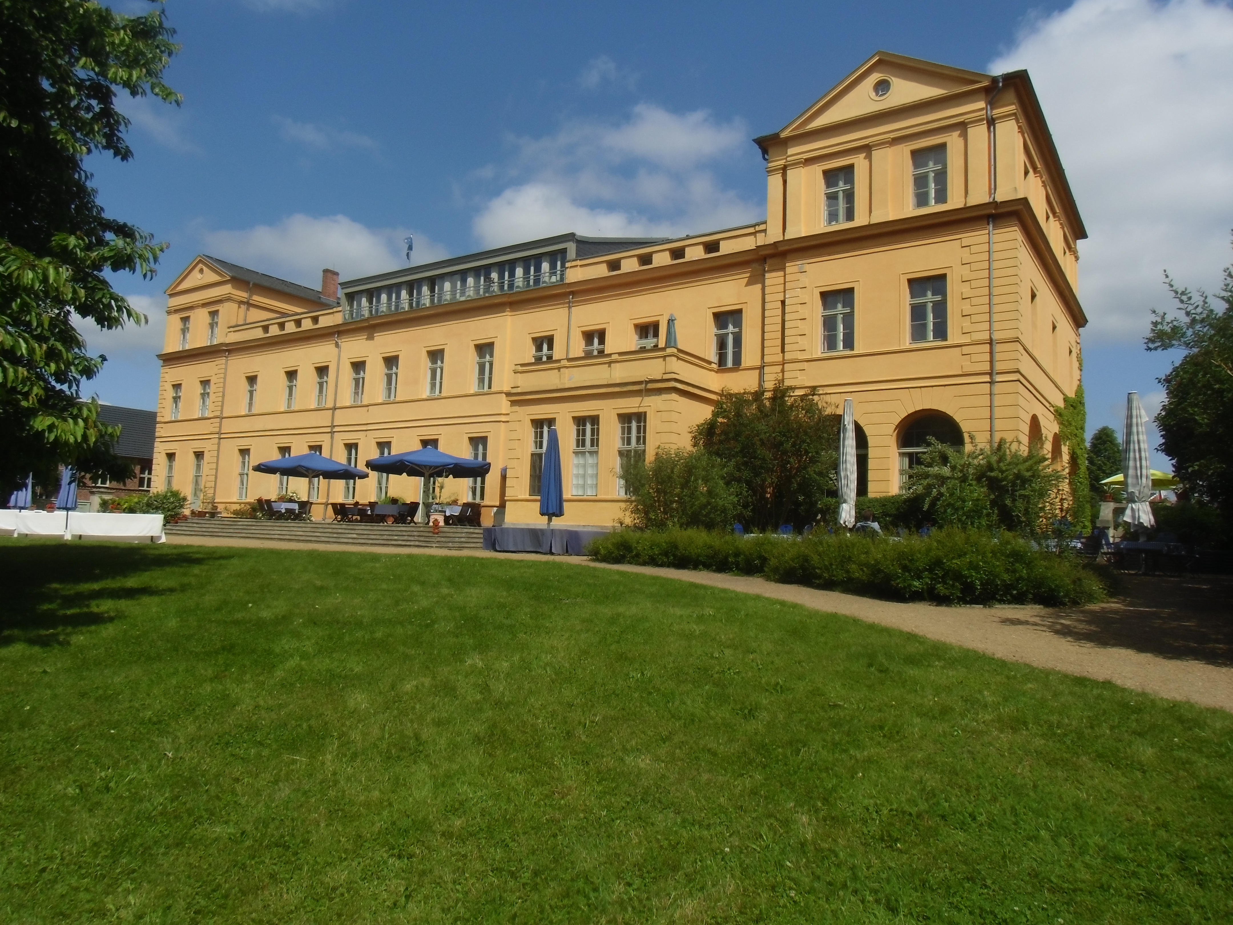 Denkmalgeschütztes ehemaliges Gutshaus in der Alten Dorfstraße von Groß-Ziethen, Ortsteil von Kremmen, jetzige Nutzung als Hotel